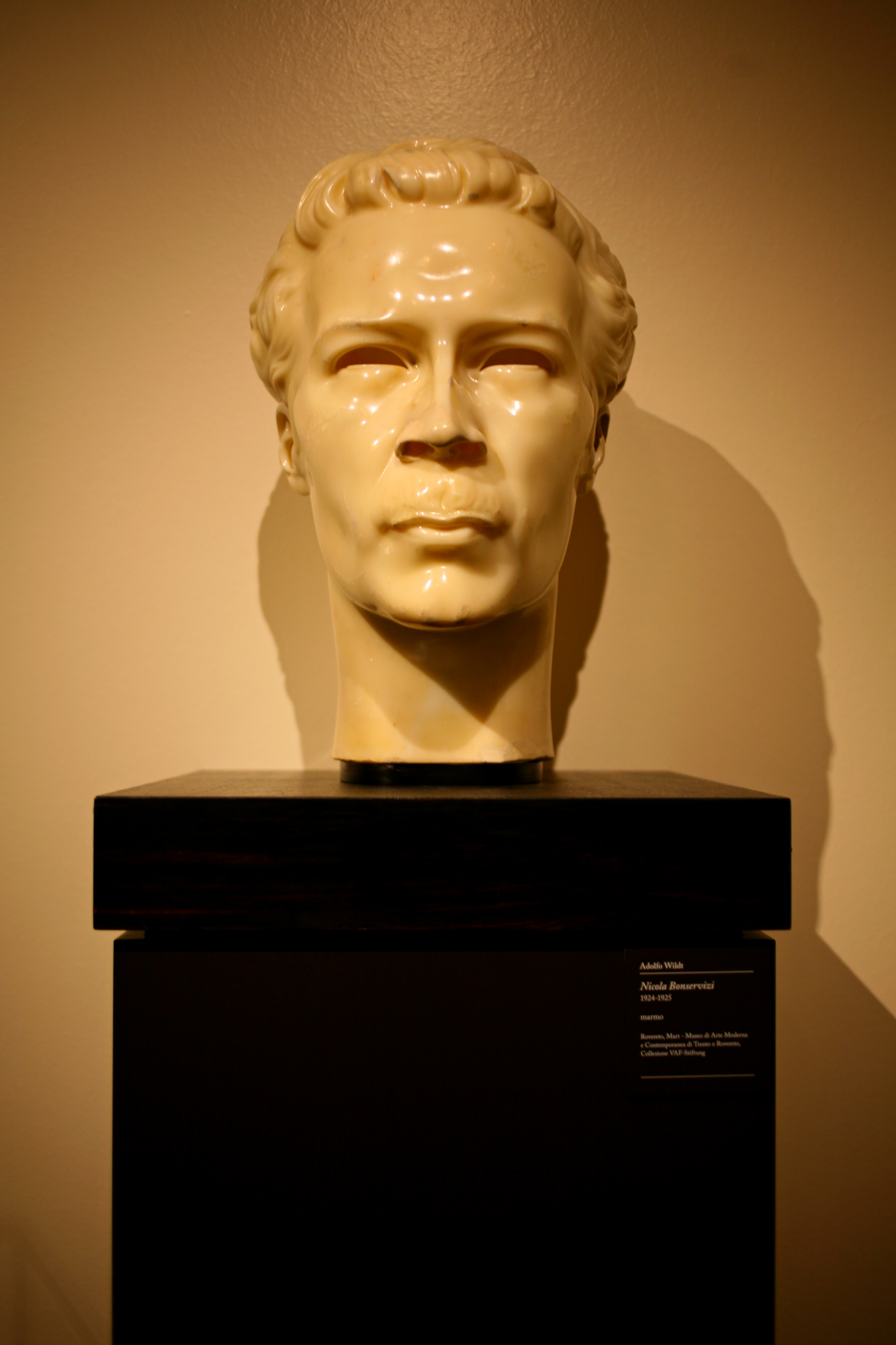 Adolfo Wildt (1868-1931) Nicola Bonservizi (1924-1925)